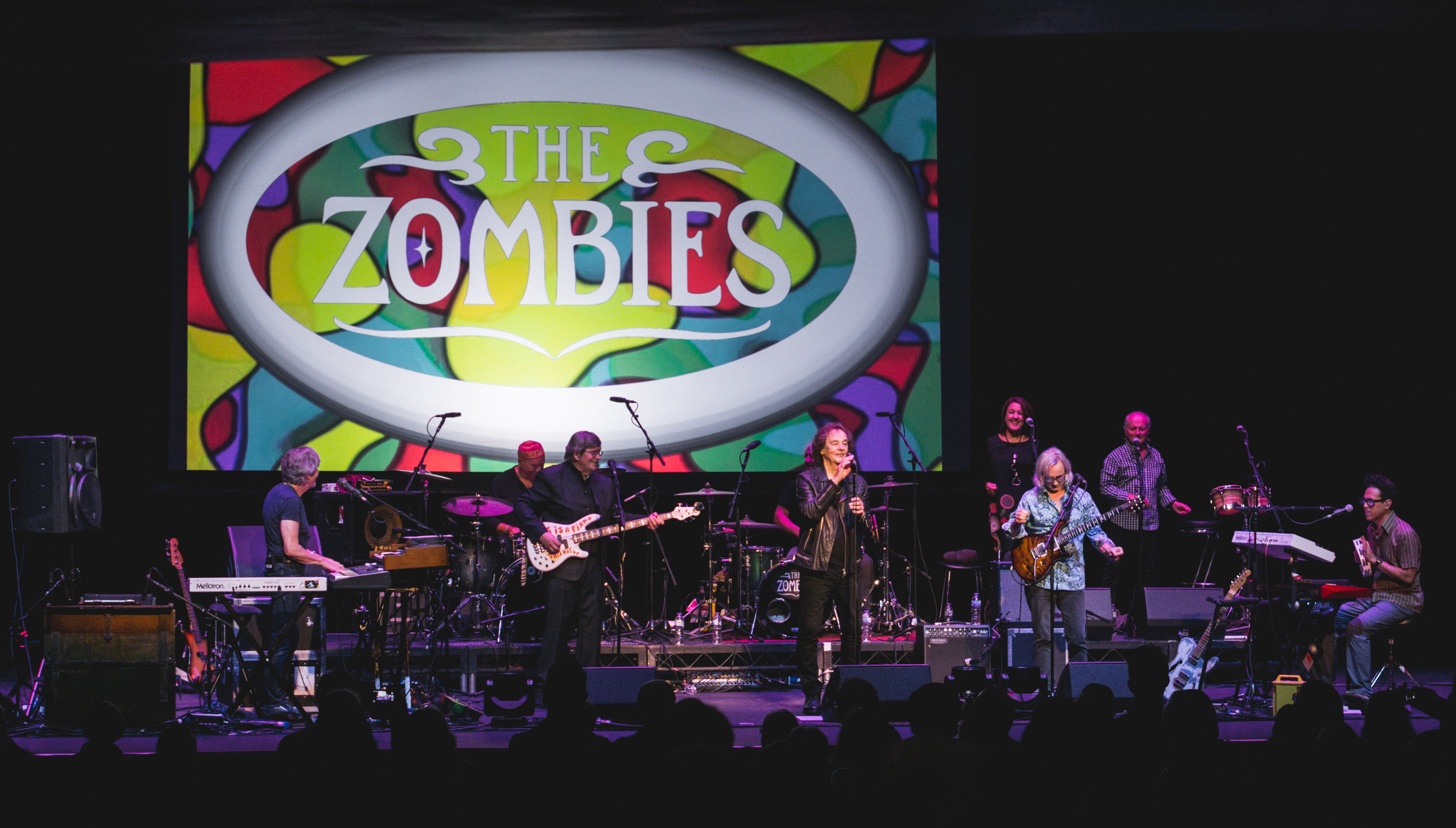 ZombiesPall290917-22